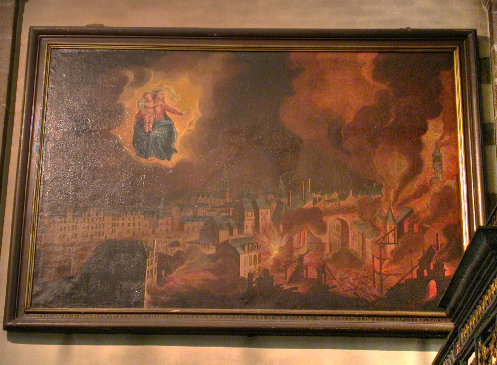 Tableau votif représentant l'incendie de Rennes de 1720, situé dans la Basilique Saint-Sauveur de Rennes. Le cadre porte l'inscription « Vœu fait à Notre-Dame de Bonne Nouvelle par les habitants des Lices, rues St Louis, St Michel, place Sainte Anne, préservées de l'incendie du 22 décembre jusqu'au 30 ».